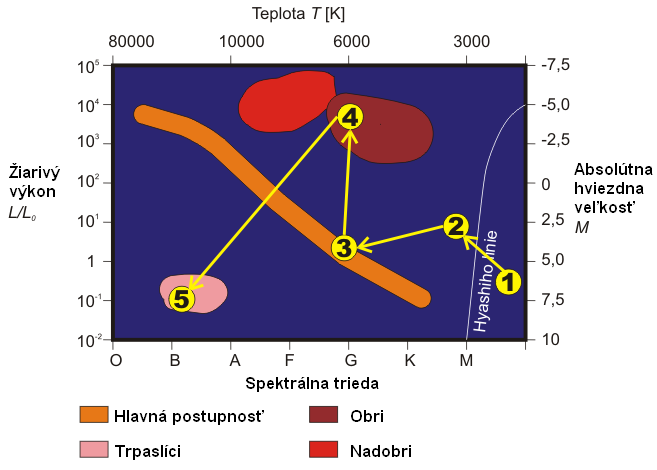 Slovenská verzia súboru Soubor:HR-diagram 01.png. Vývoj hviezd malých hmotností na Hertzsprungovom Russelovom diagrame